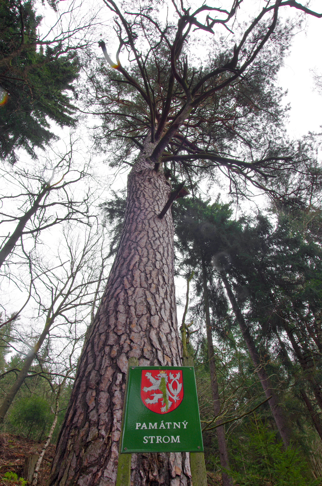 památný strom - borovice u Svatavy, okres Sokolov